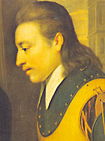 Geportretteerde overleed in 1574.